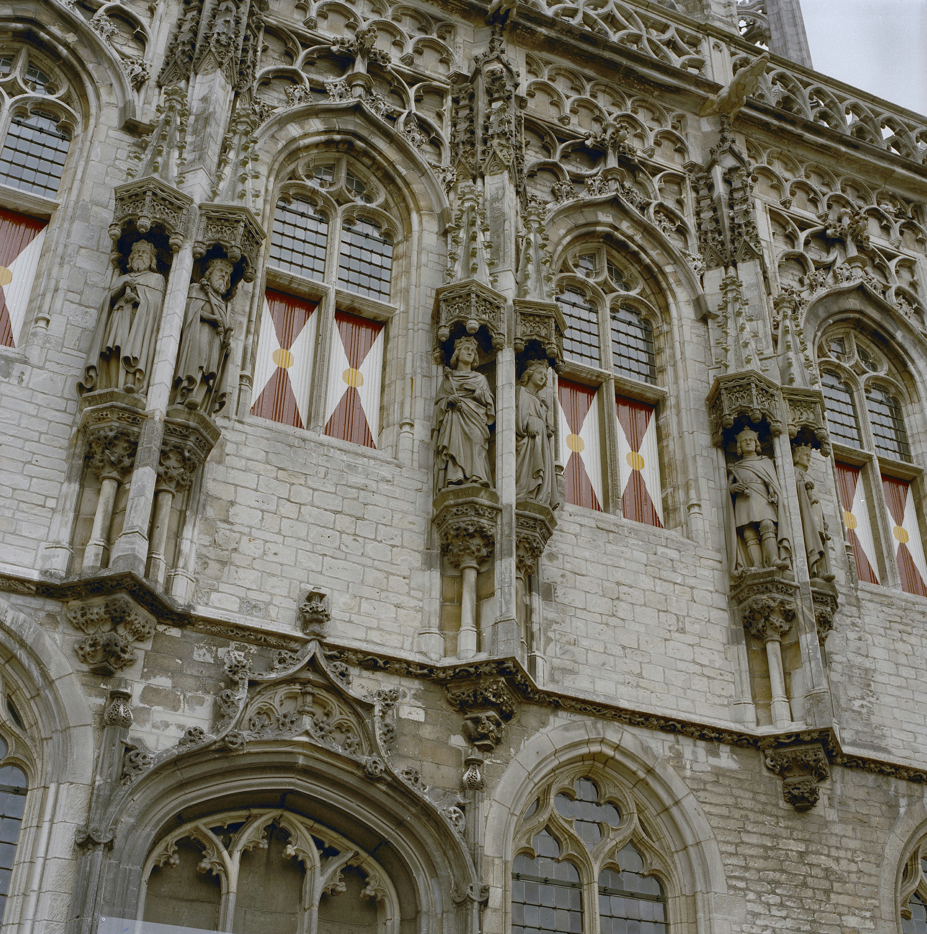 Stadhuis: Exterieur GEDEELTE VAN DE VOORGEVEL